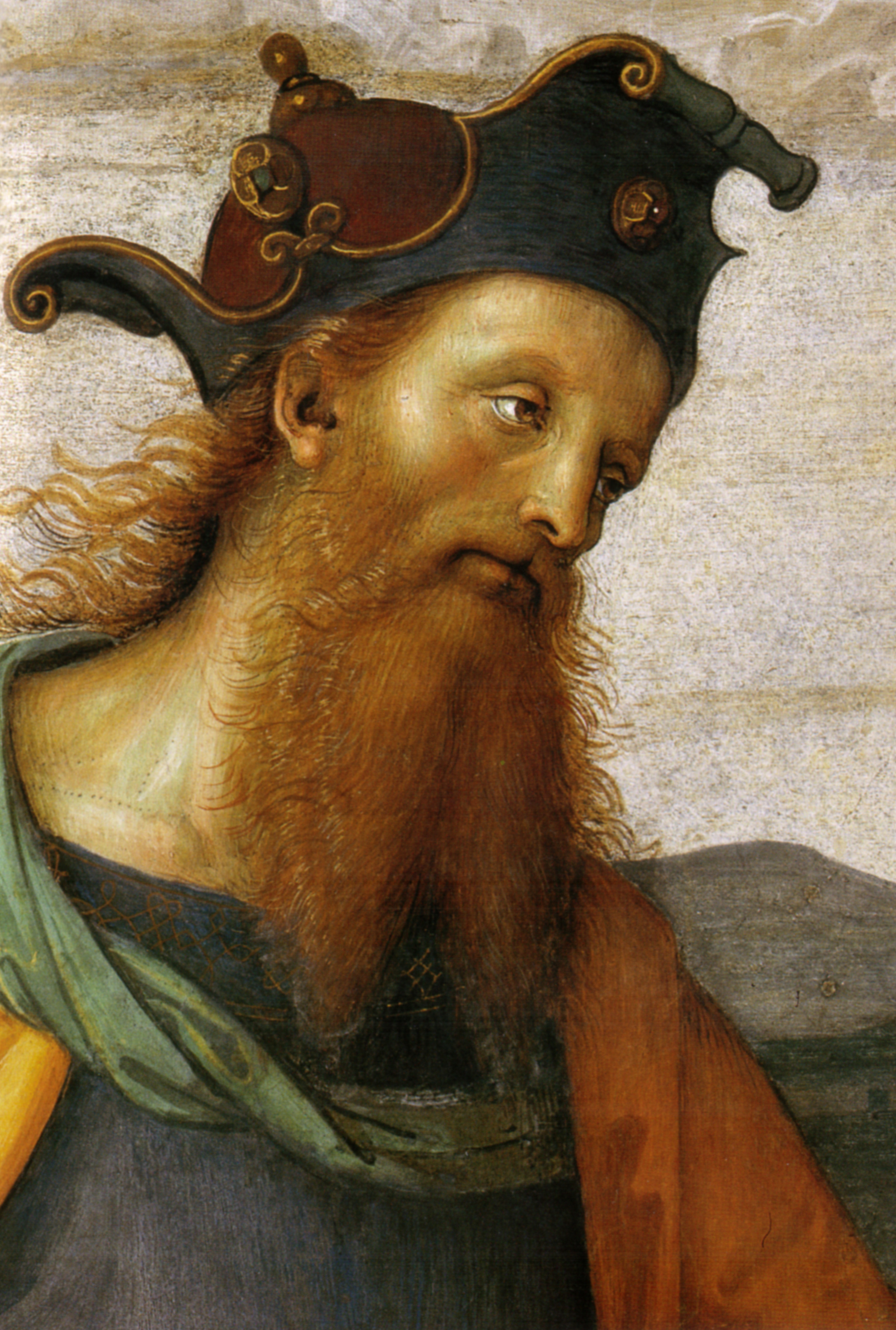 PERUGINO, Pietro Fresco, Collegio del Cambio, Perugia